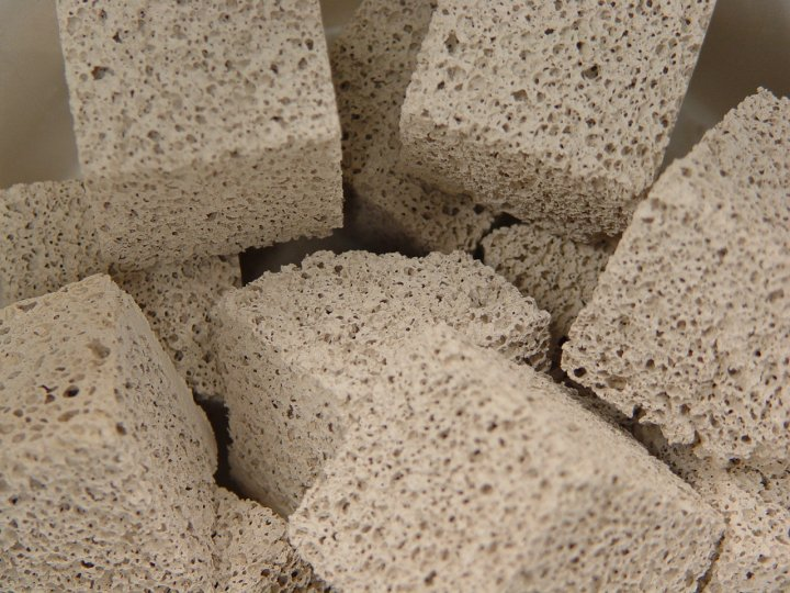 Porous Ceramic